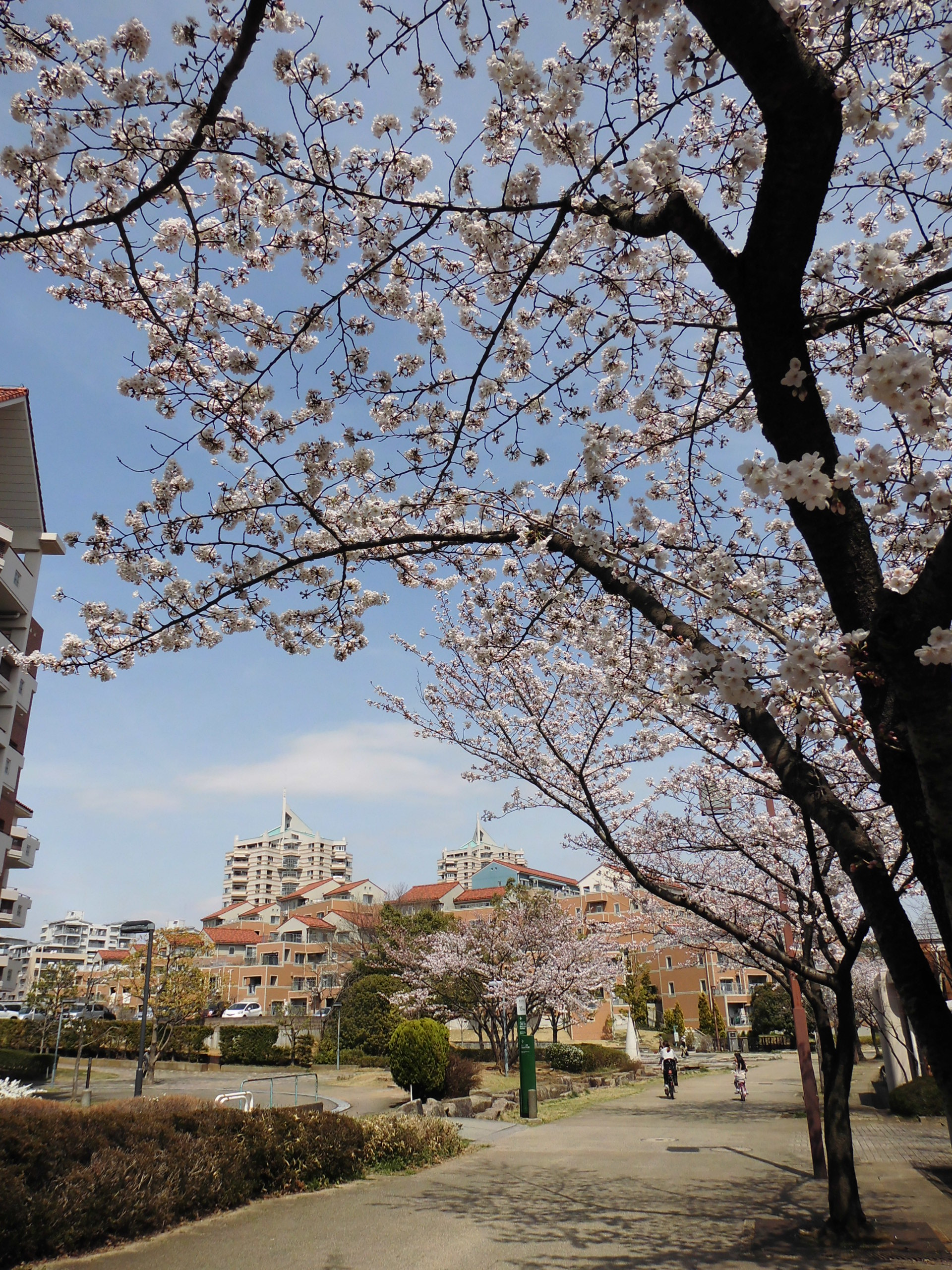 南大沢駅前から都立小山内裏公園へと続く多摩ニュータウンの遊歩道の桜並木